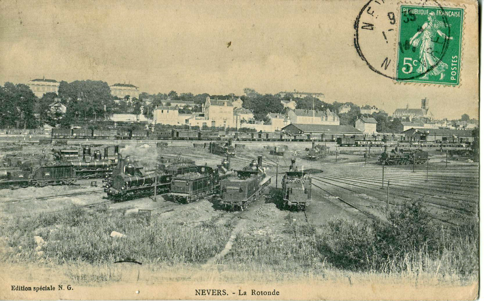 Carte postale ancienne éditée par Édition spéciale N. G. :NEVERS - La Rotonde